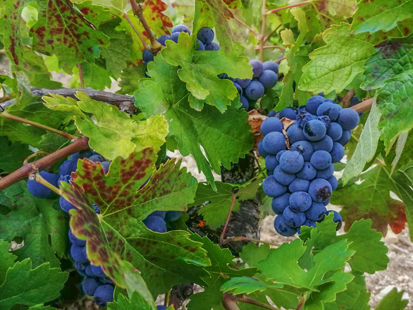 racimo uva rufete Ruta del vino Sierra de Francia